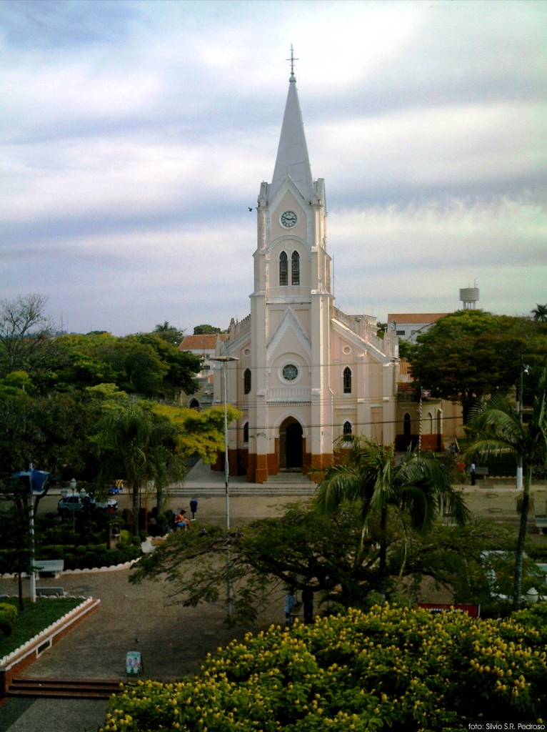 Igreja Matriz de Angatuba, localizada na Praça Monsenhor Ribeiro. Data: 22/SEP/2006 Autor: GronkOkara